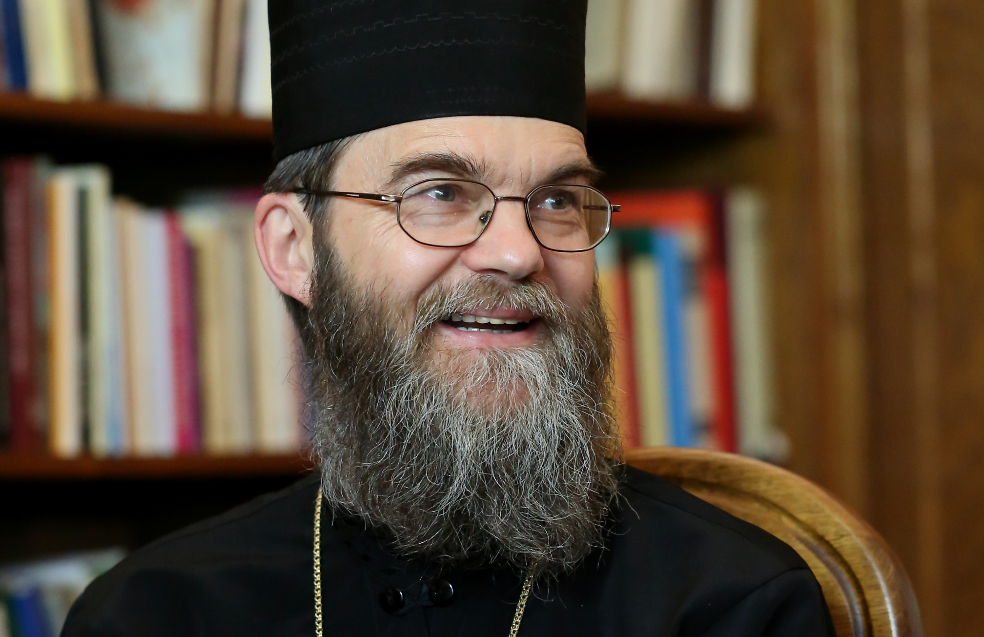 Dr. Orosz Atanáz püspök exarcha